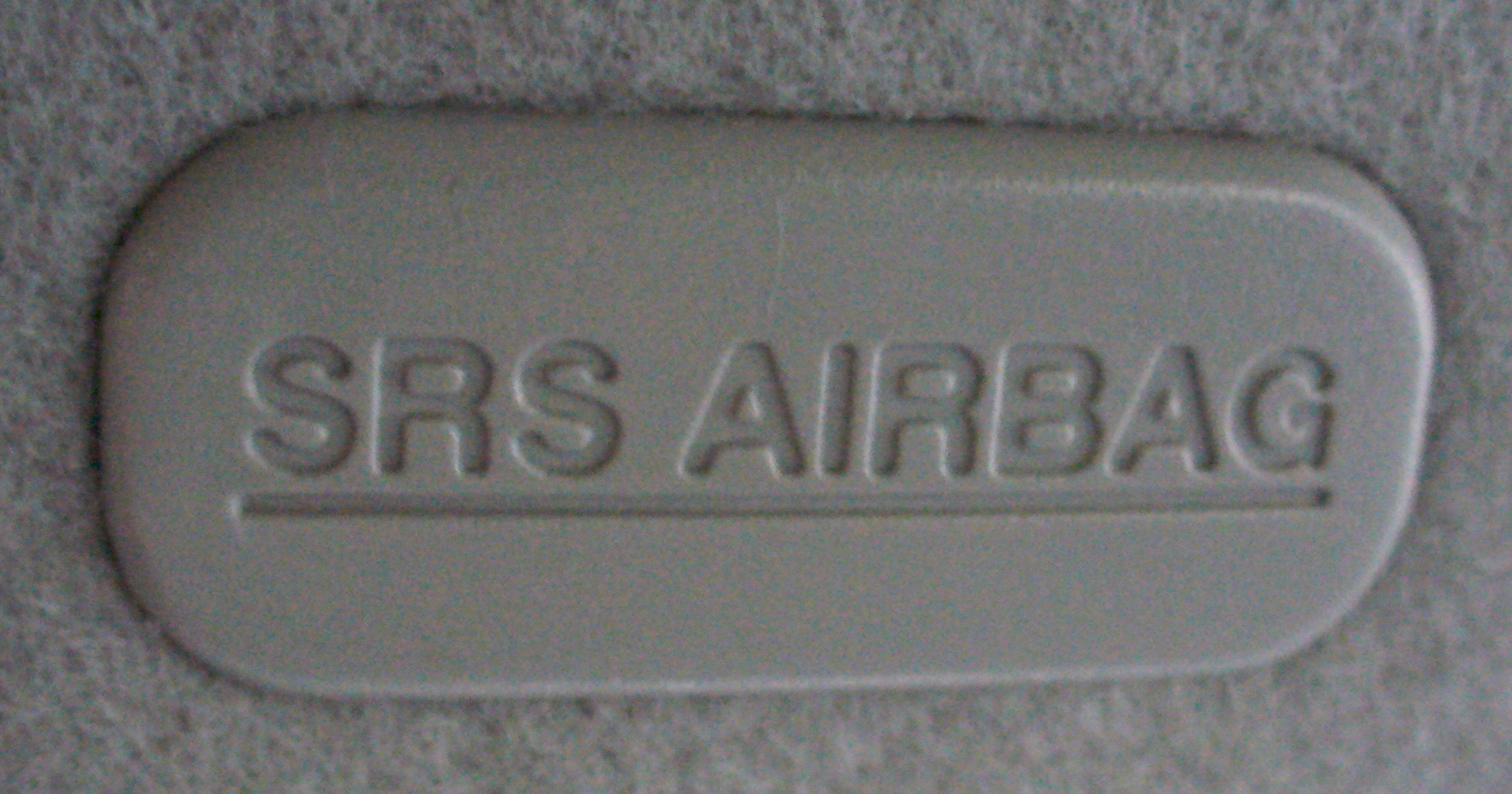 SRS-Kopfairbag im Mazda2